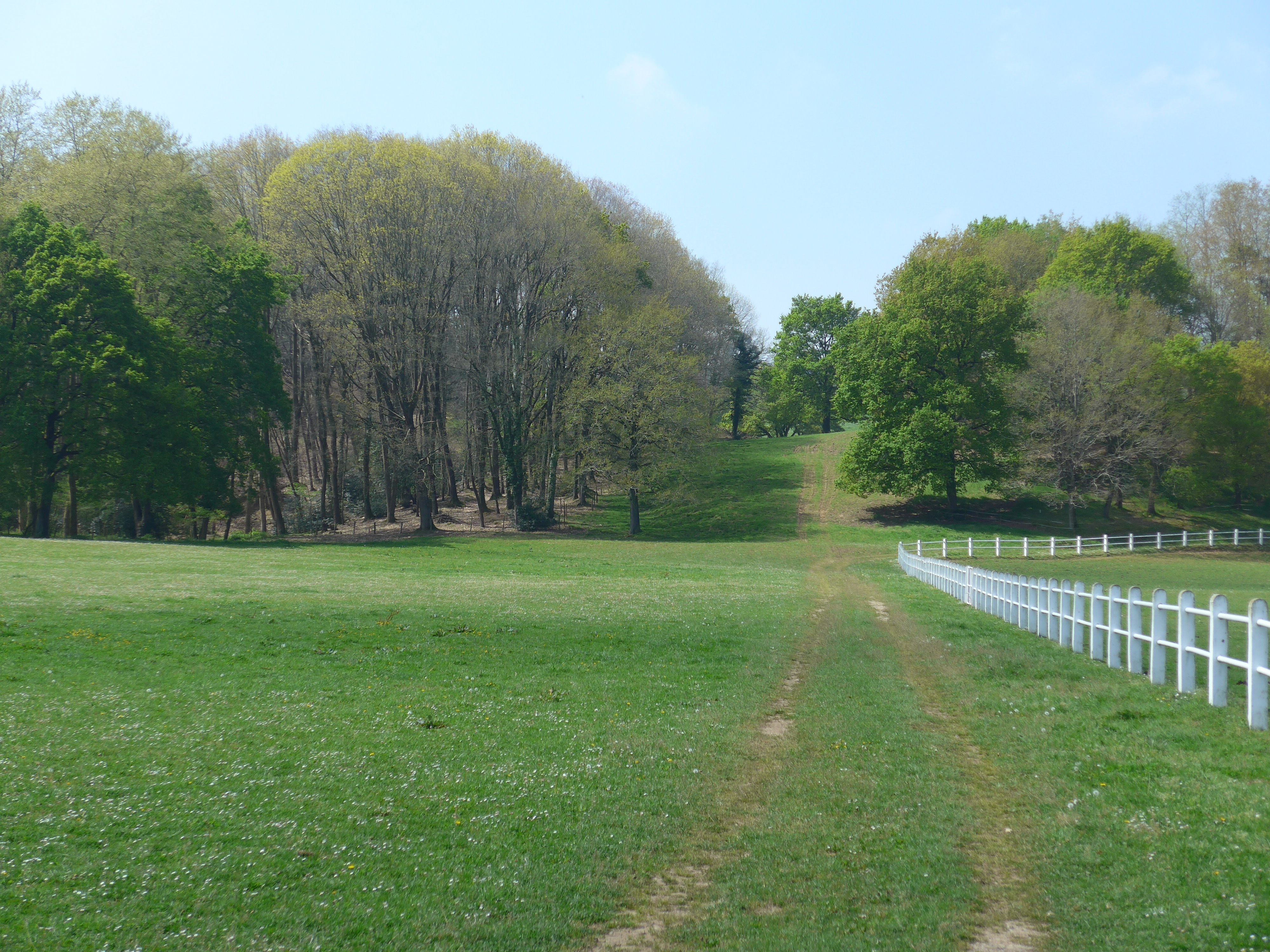 Finca del marqués de Bustamante en Villapresente, aunque perteneciente a la pedanía de Quijas.